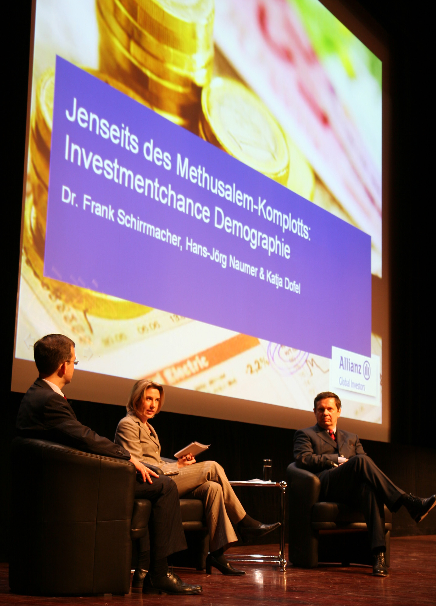 FAZ-Mitherausgeber Frank Schirrmacher (rechts) am 31. Januar 2006 zusammen mit Hans-Jörg Naumer (dit/Allianz Global Investors) und Moderatorin Katja Dofel auf dem "Fonds professionell Kongress" ( in Mannheim.